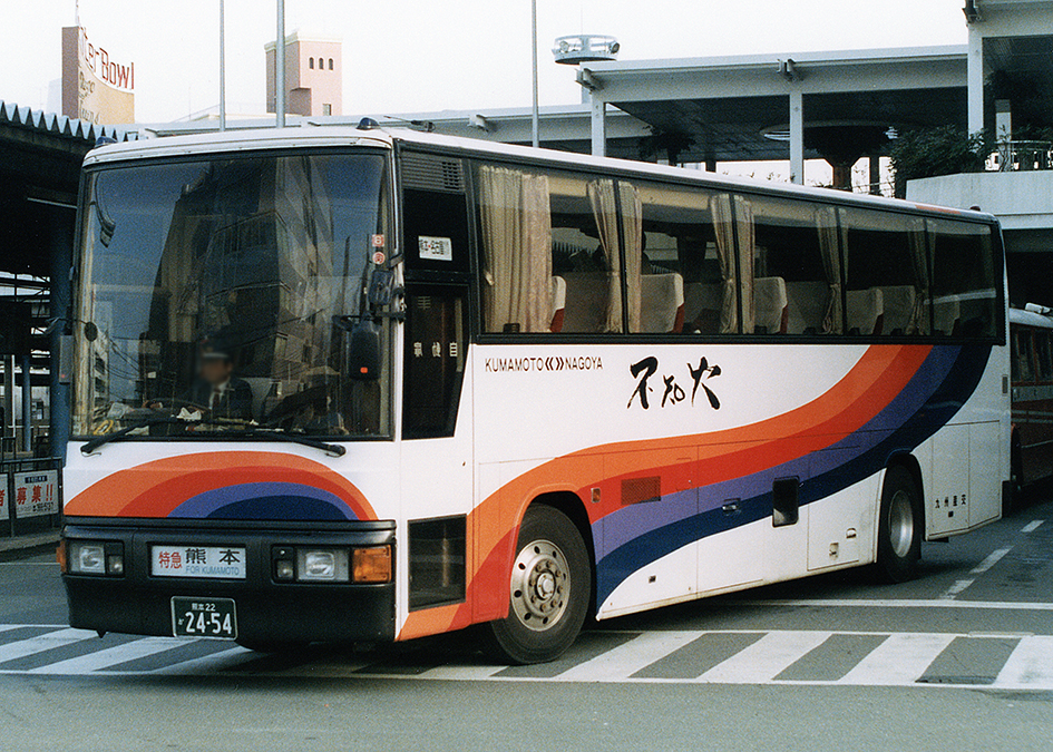 九州産業交通 不知火号 三菱ふそう・エアロクィーン P-MS729S 西工58MC SD-II